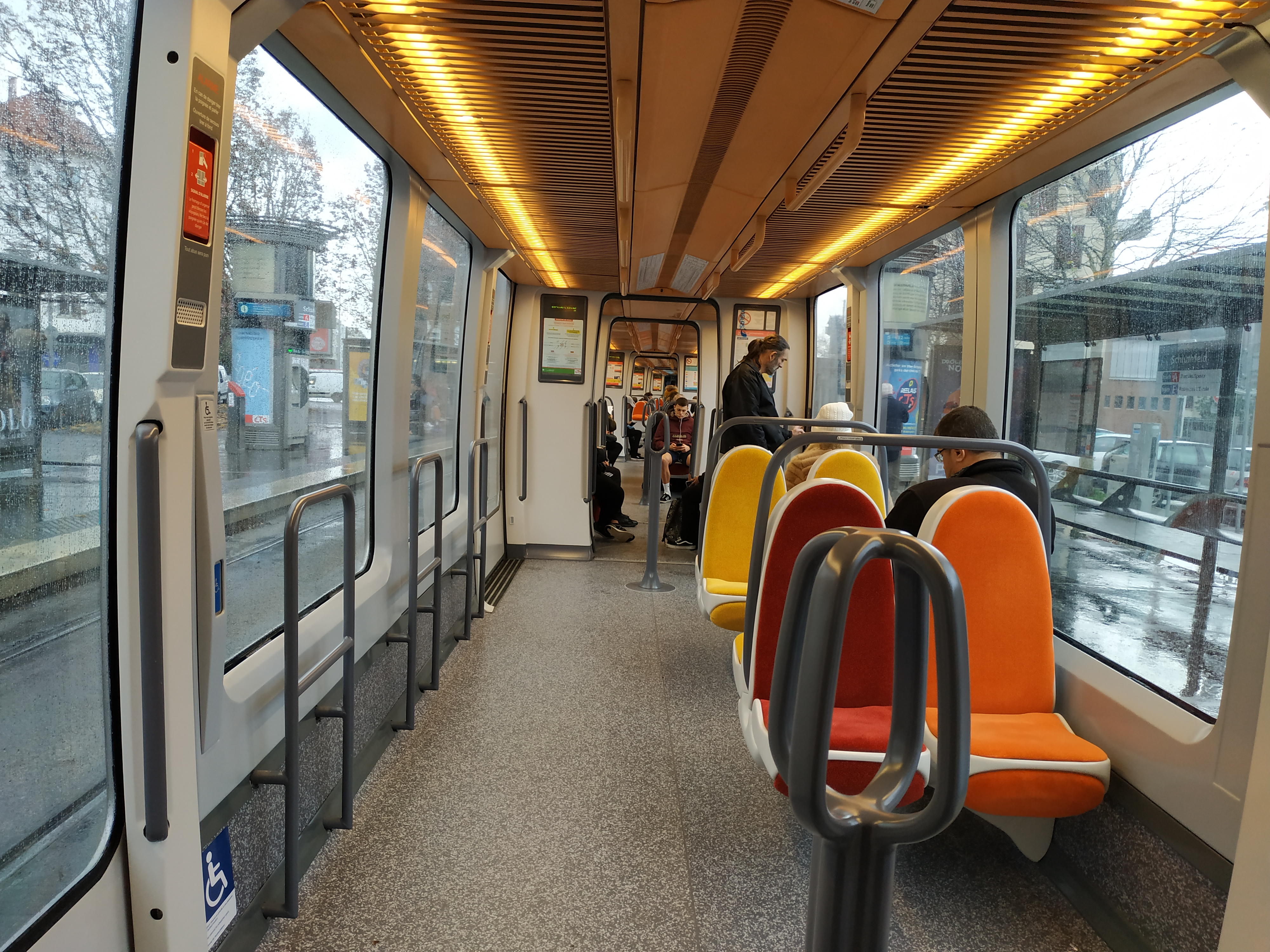 Vue intérieure de la rénovation d'un Eurotram CTS en 2019, ici la rame 1054.